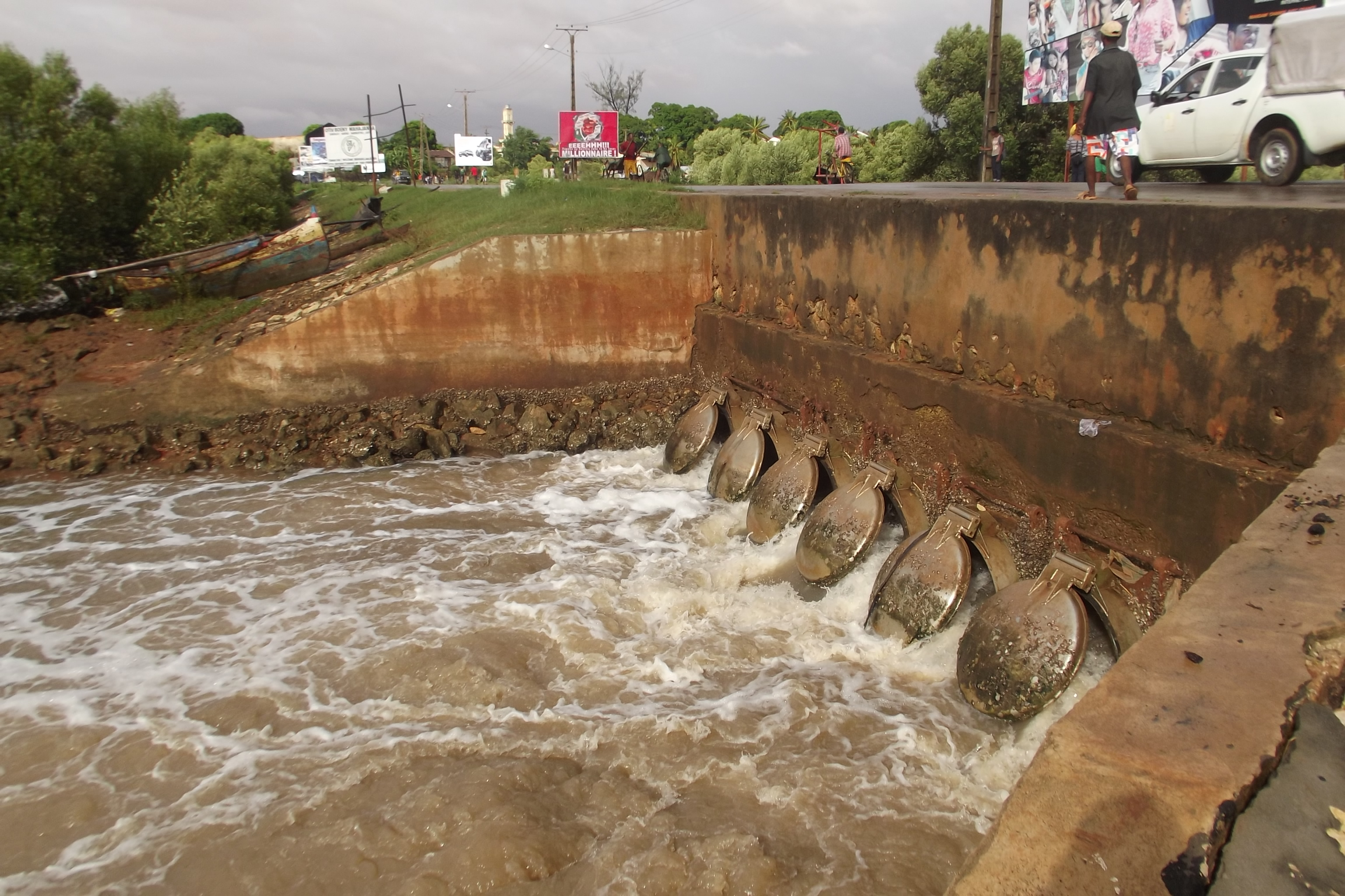 Barrage à Fiofio sur la RN4, route d'antananarivo